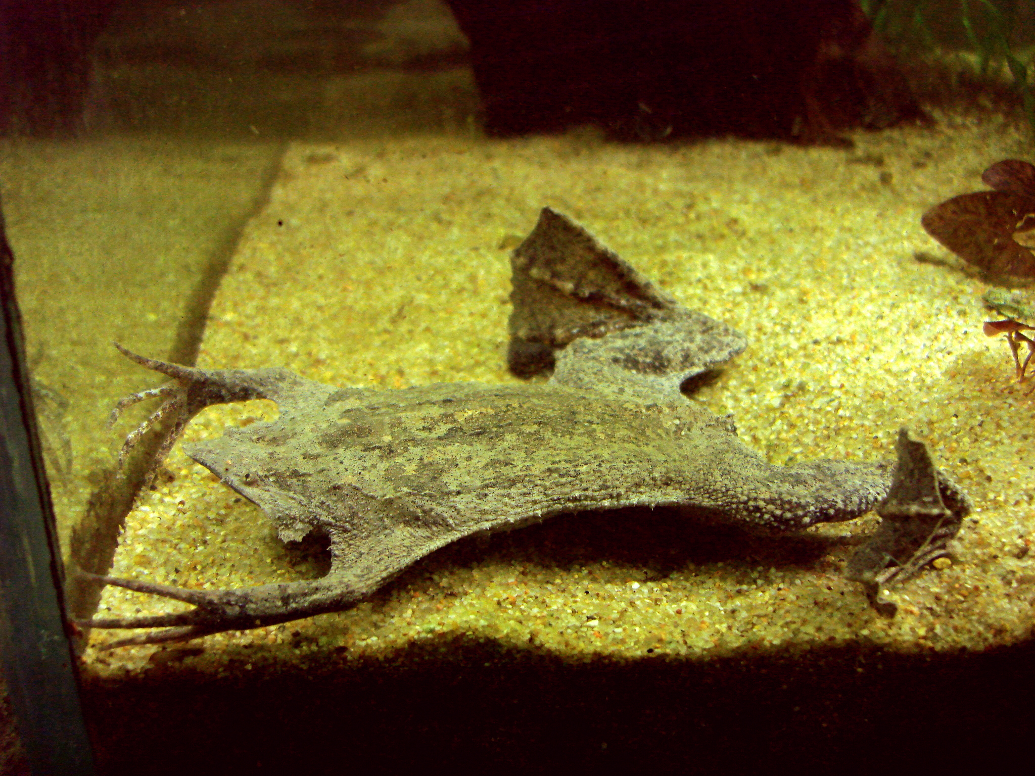 Pipa pipa